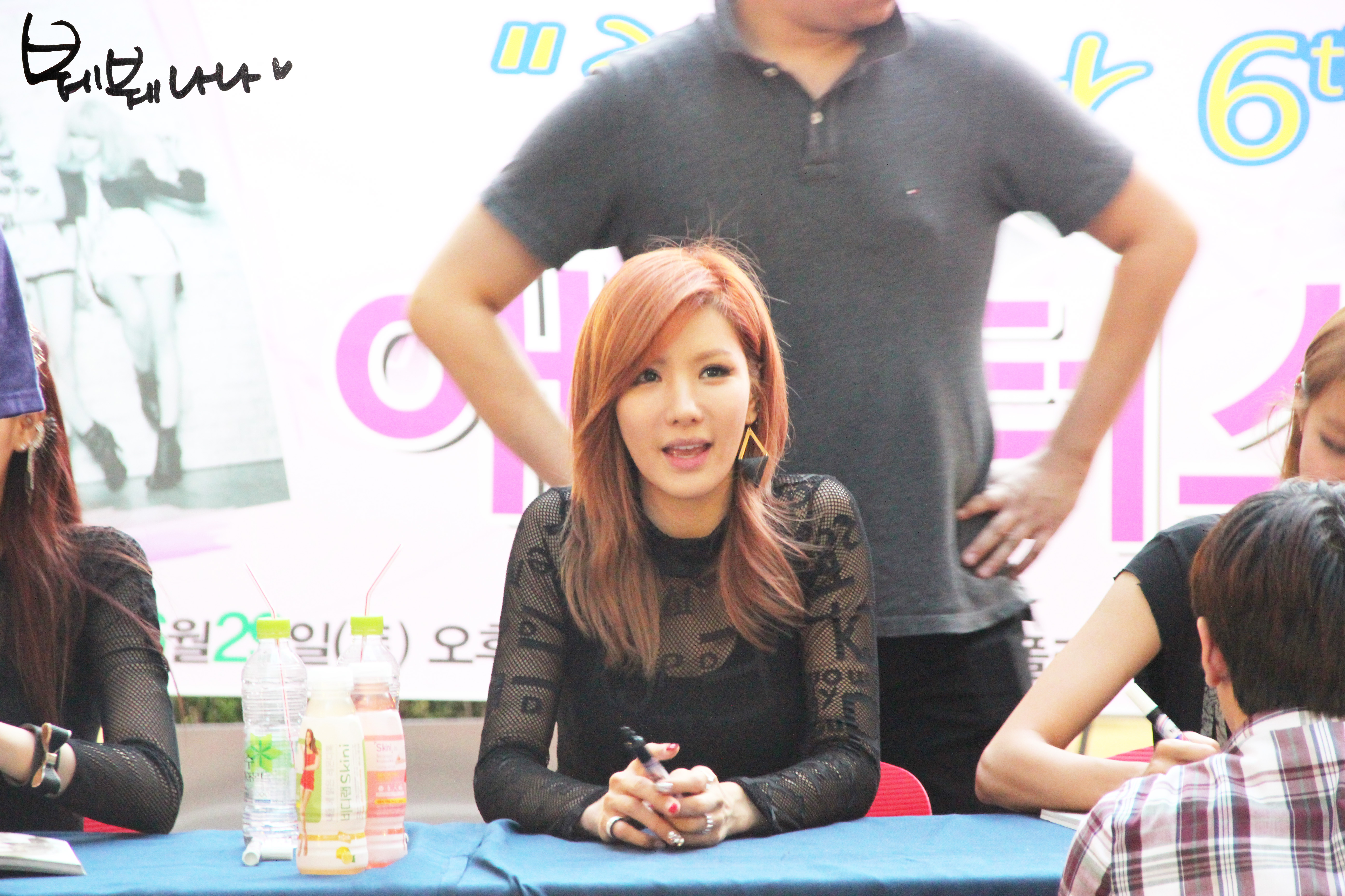 130629 애프터스쿨 메세나폴리스 '첫사랑' 팬싸인회